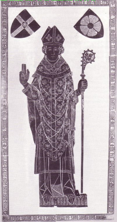 Grabplatte des Bischofs Bernhard V. zur Lippe, Dom zu Paderborn